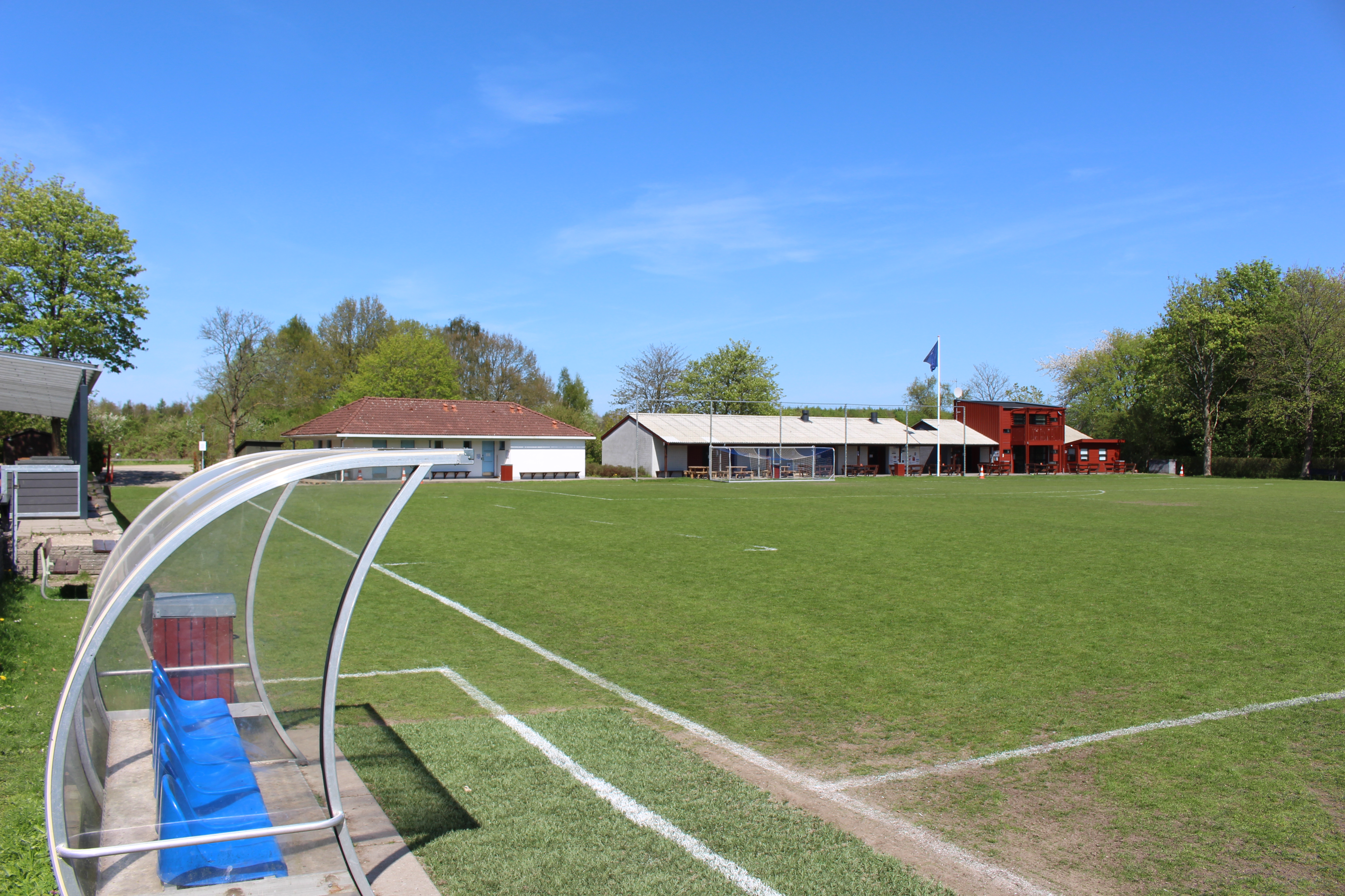 Herstedøster Idræts Club